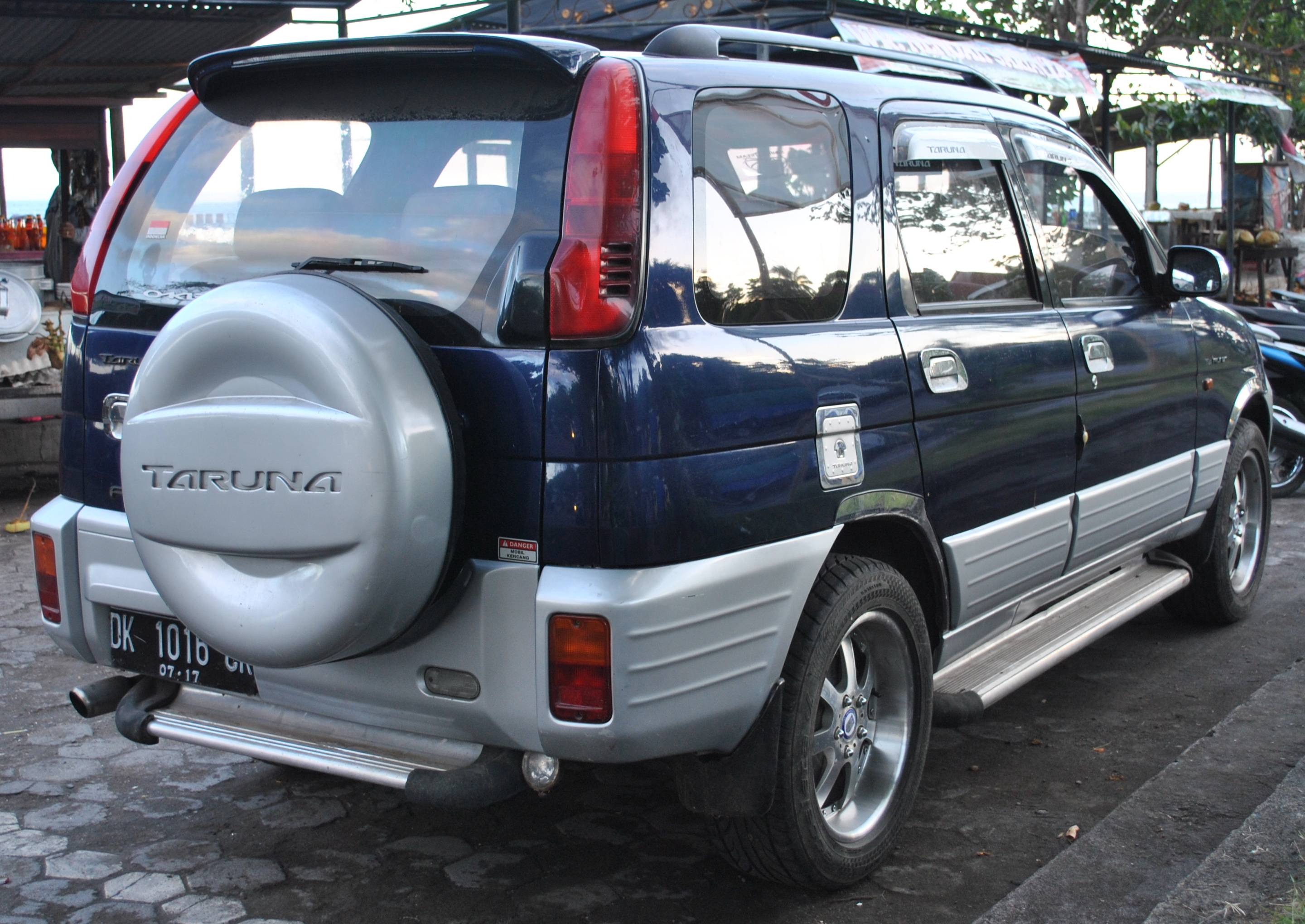 Versi wheelbase yang diperpanjang dari Daihatsu Terios generasi pertama (yang tidak dijual di Indonesia) di perbatasan Kab. Karangasem dan Kab. Klungkung, Bali.